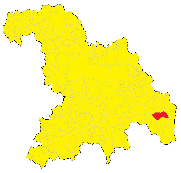 Mappa del comune di Albera Ligure (AL)